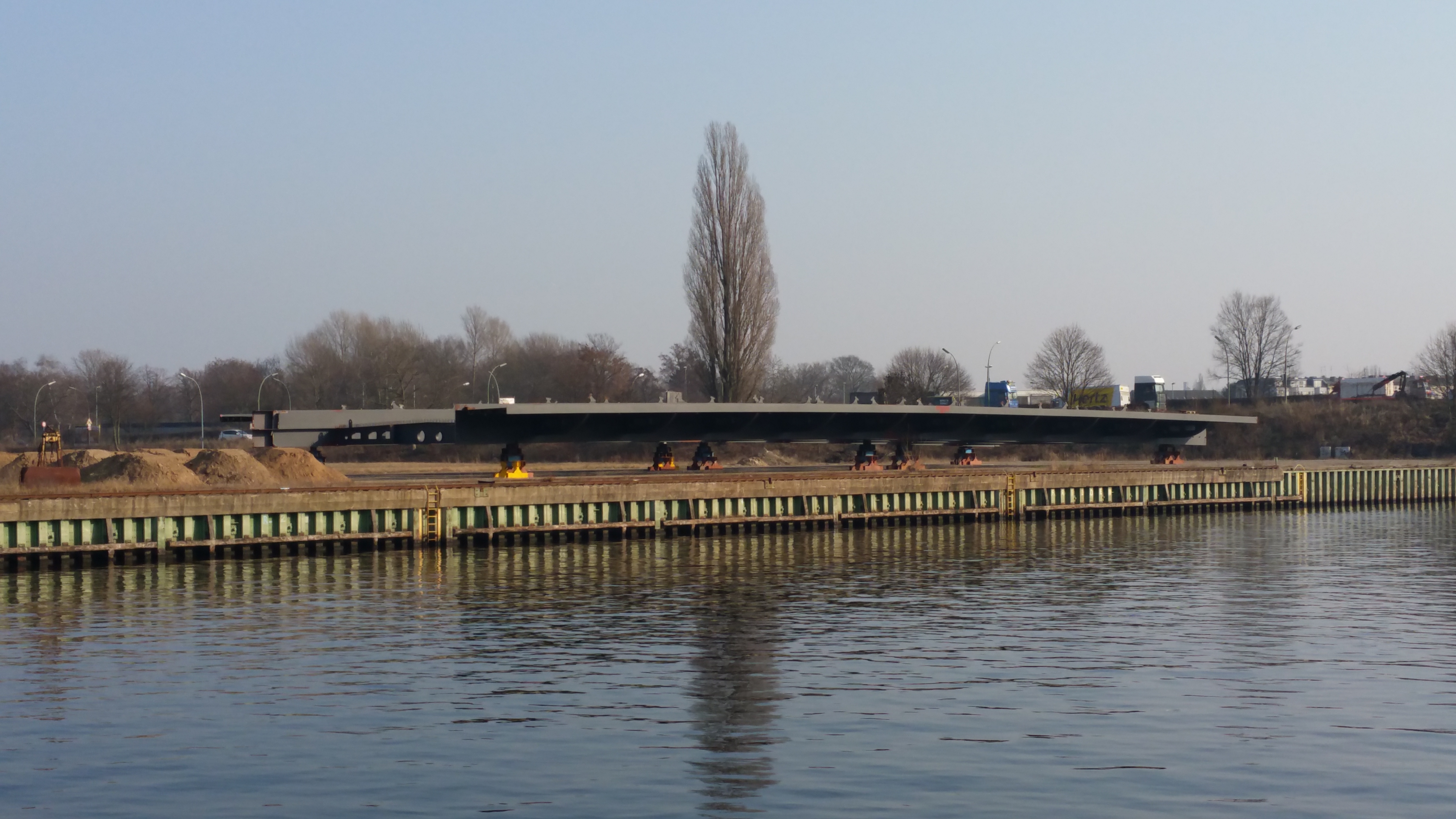 Das Mittelteil der neuen Freybrücke bei der Vormontage im Lager im Spandauer Südhafen